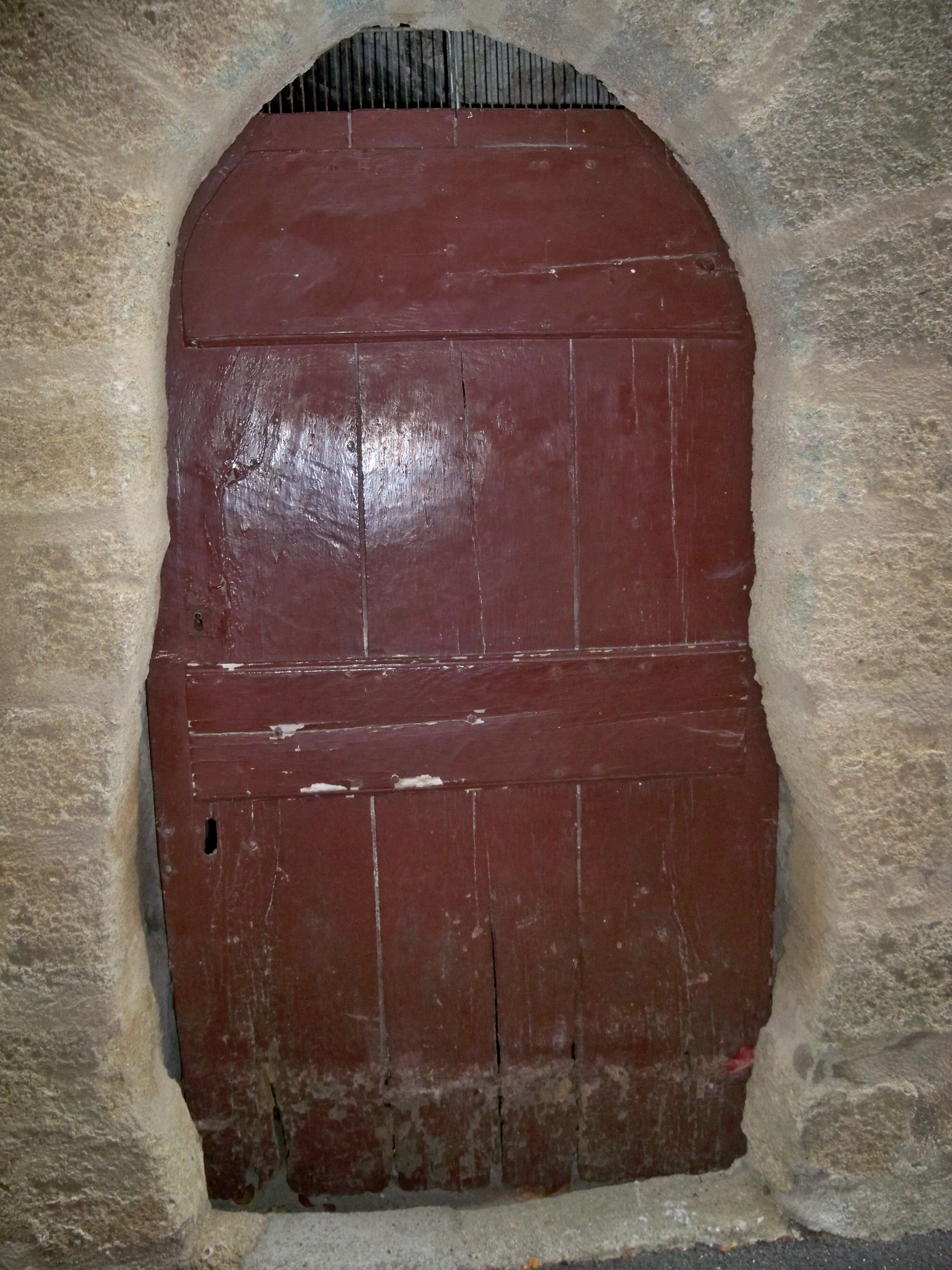 Porte de tonneliers à Viens, Vaucluse, France